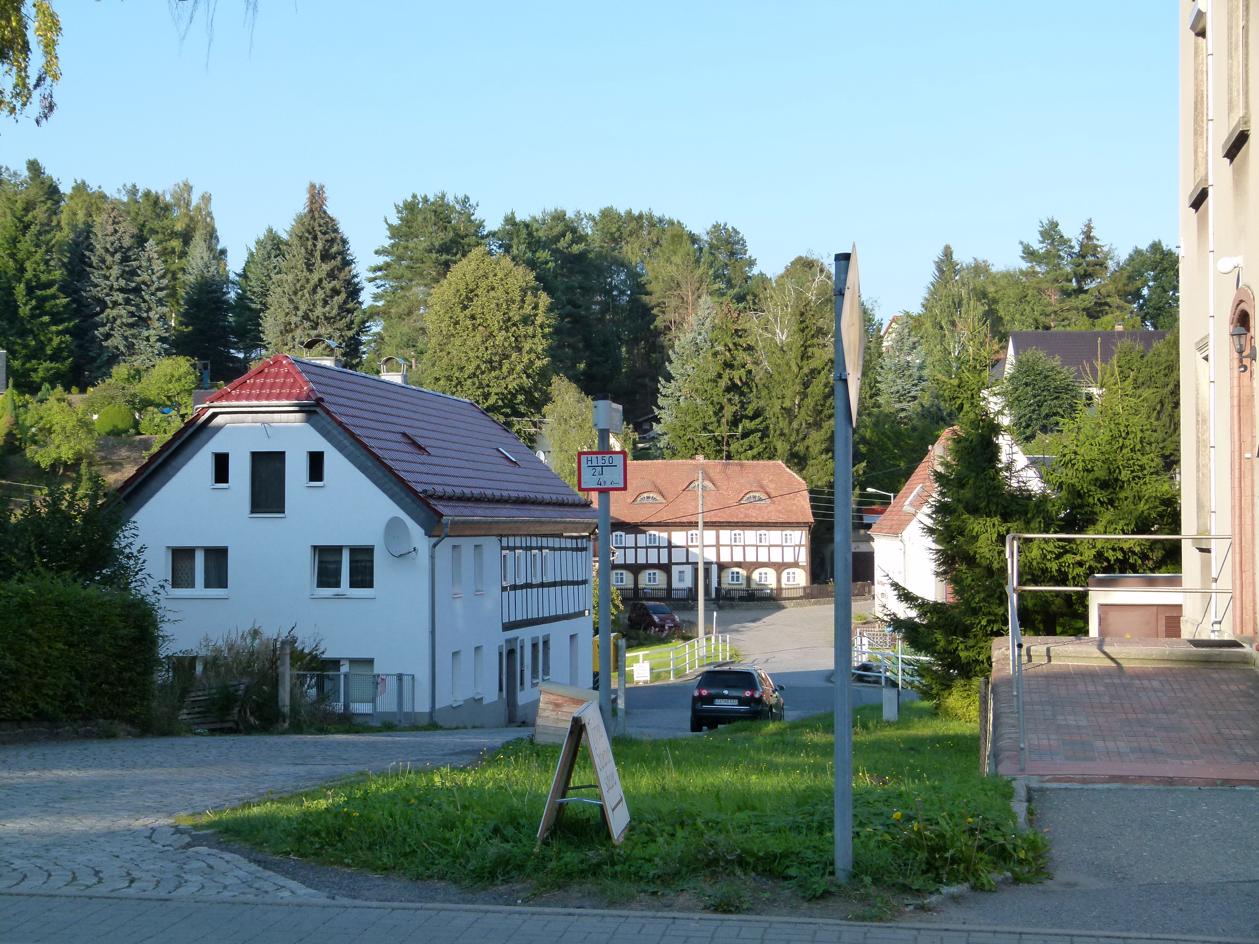 Umgebindehaus, Bergweg 5, Oderwitz